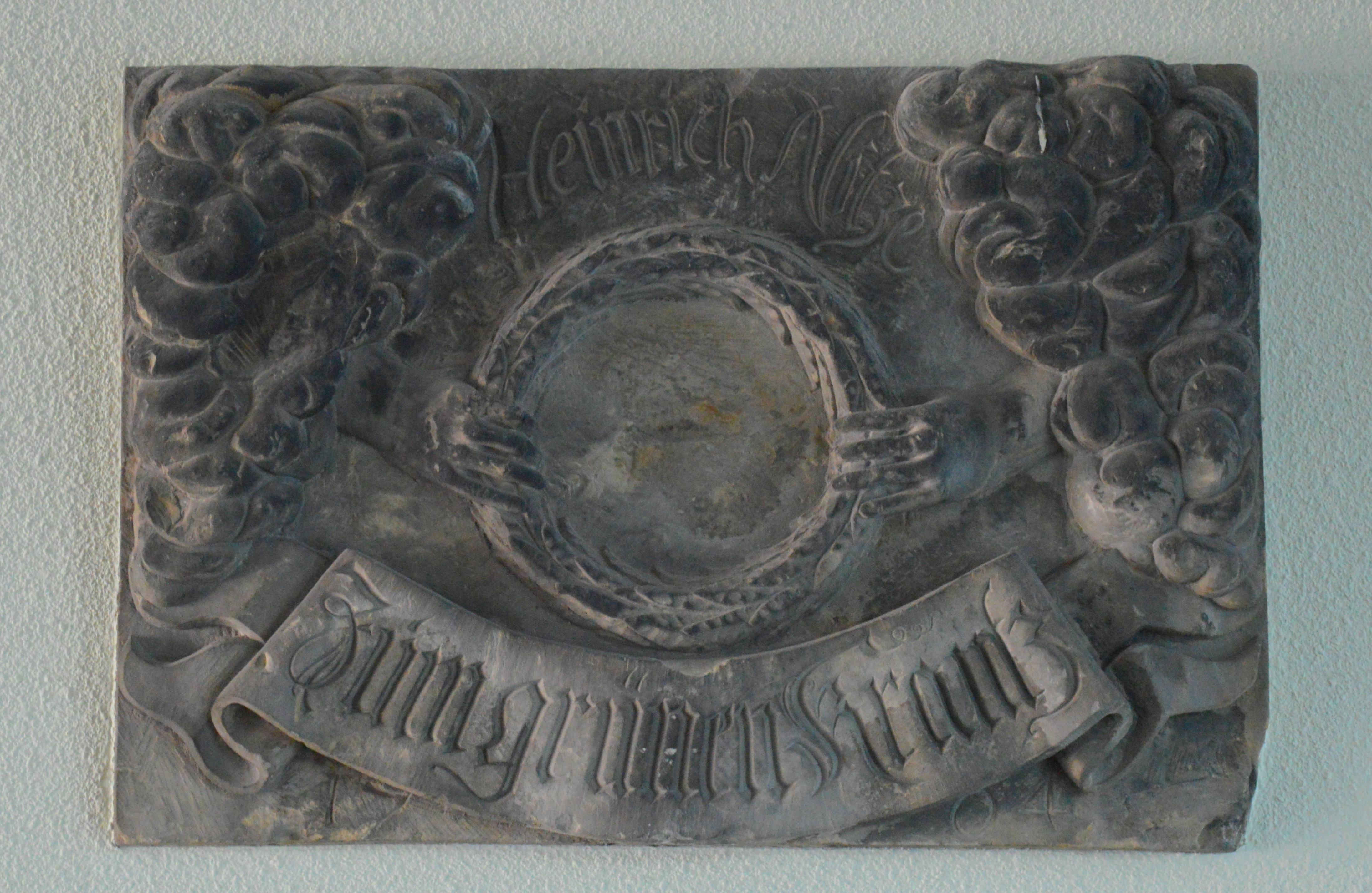 Alter Markt 12, 13 Hauszeichen Magdeburg